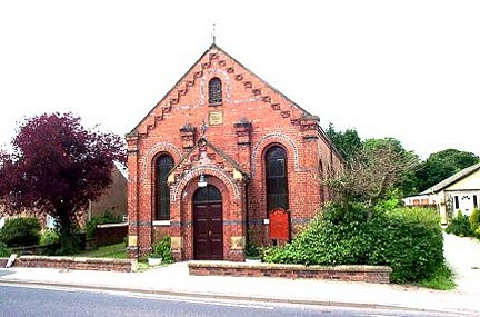 Burn, Methodist Church